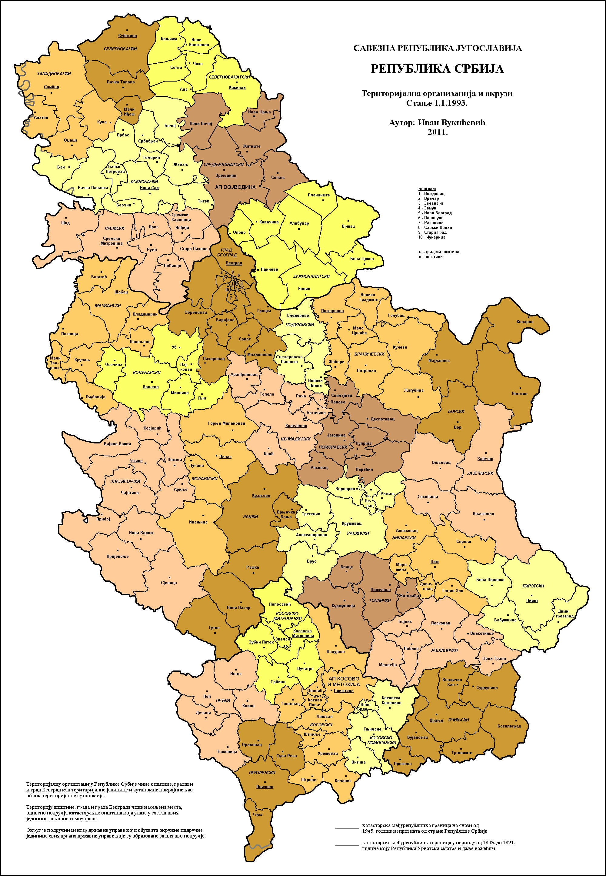 Територијална организација и окрузи у Србији 1993. године. Аутор: Иван Вукићевић